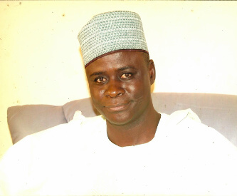 Sen. Saleh Usman Danboyi